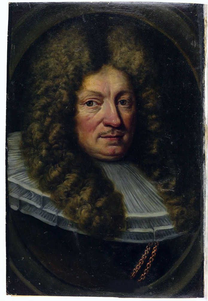 Transkription und weitere Informationen Johann Adam Geudern von und auf Heroldsberg und Stein (Geuder von Heroldsberg und Stein), Pfleger der Landauerschen Zwölfbrüderstiftung